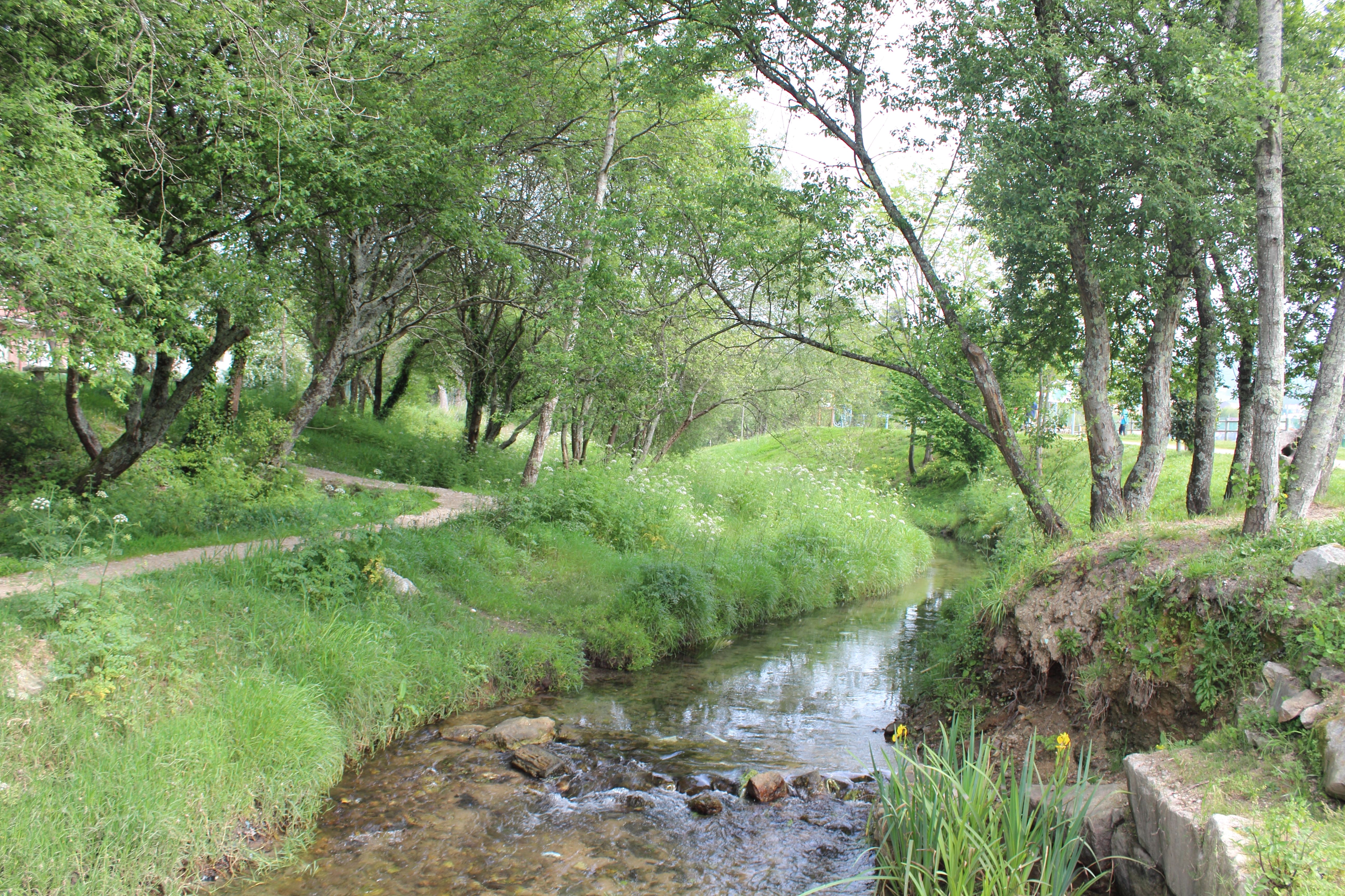 Rio Pexegueiro